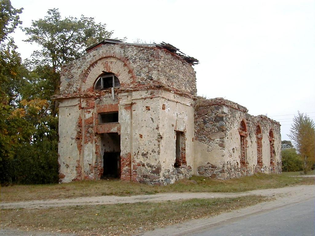 Sniķeres luterāņu baznīcas drupas 2002-09-07